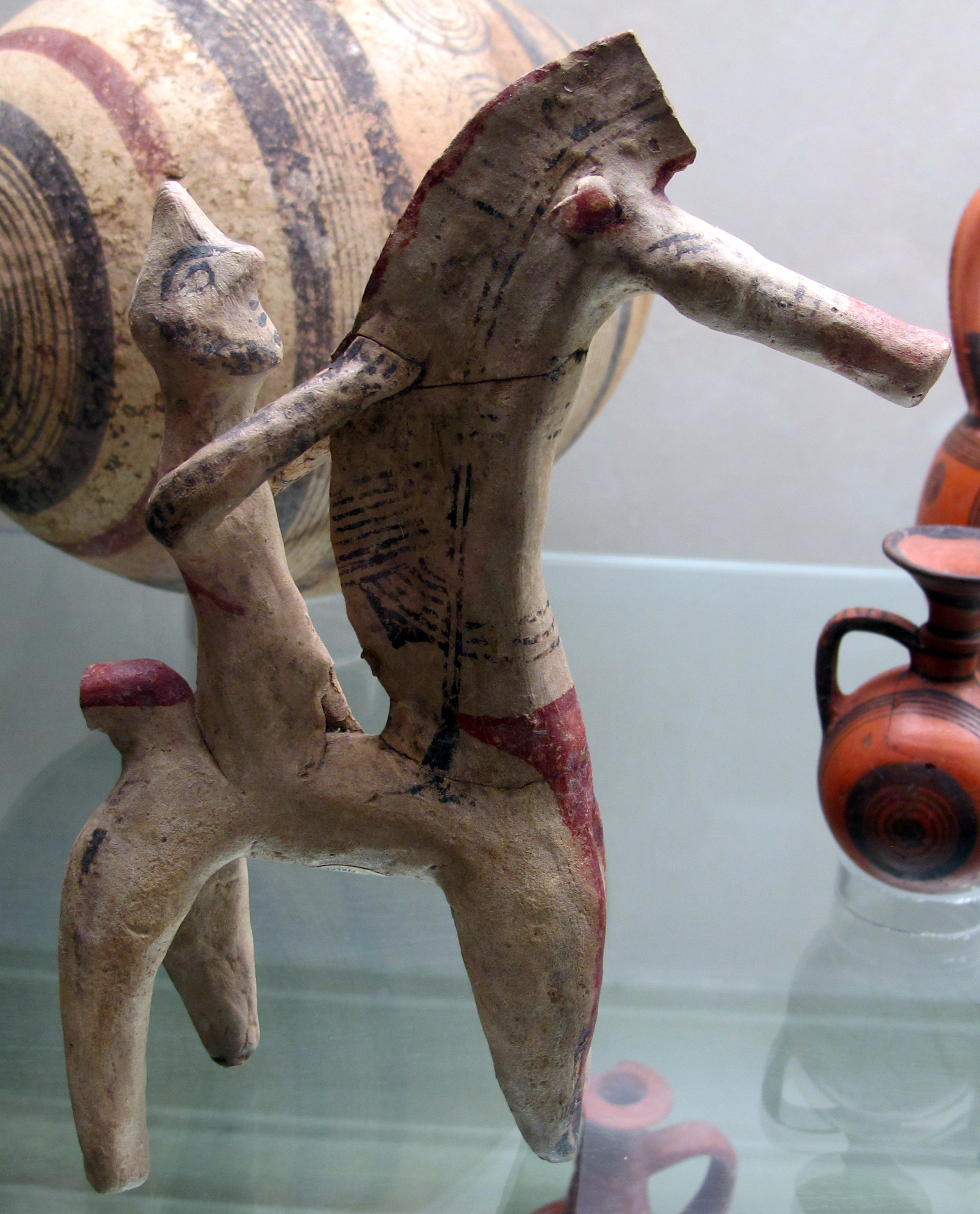 Museo archeologico di Firenze